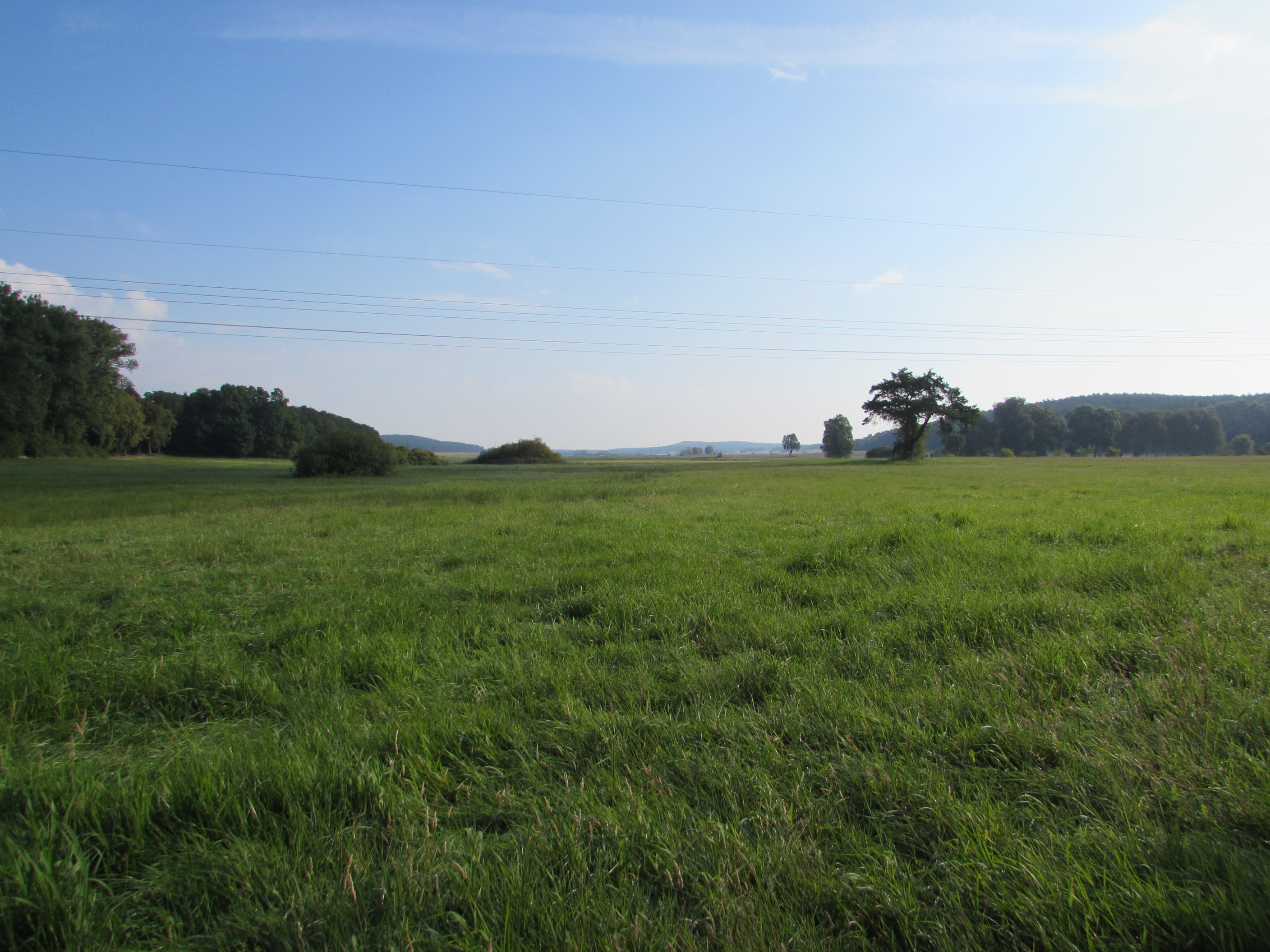 marzahner fenn südlich marzahnes, blick nach nordosten